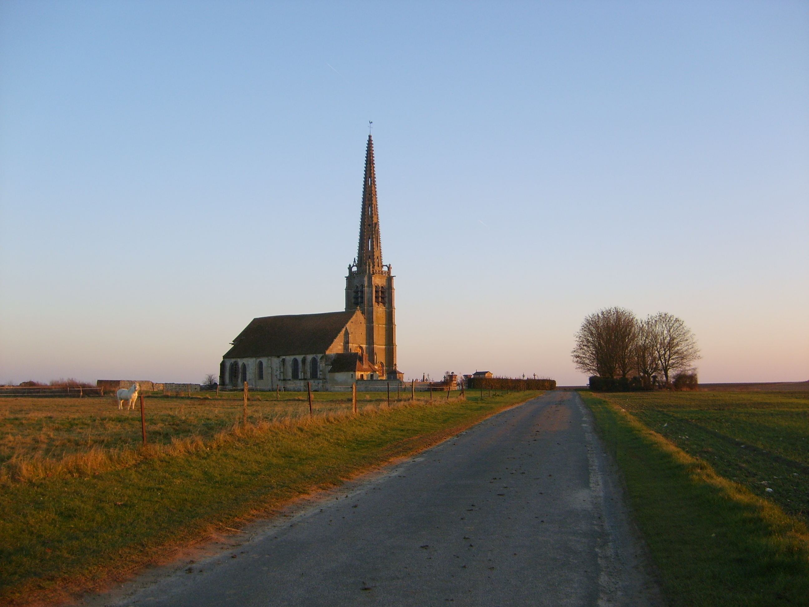 Eglise Sainte Félicité - Montagny